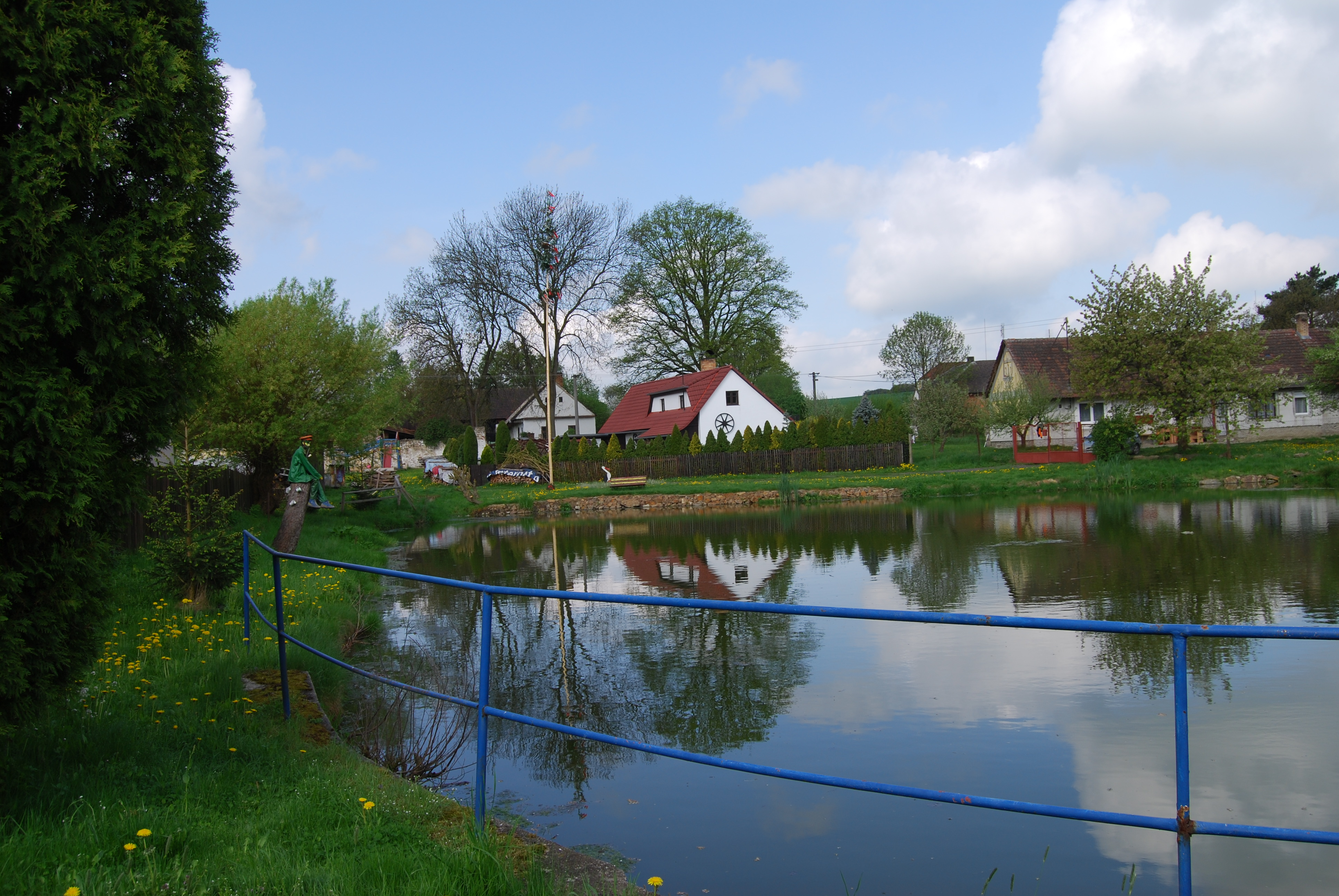 Pohled na část vesnice přes návesní rybník. Bojenice je část obce Bernartice v okrese Písek. Česká republika.